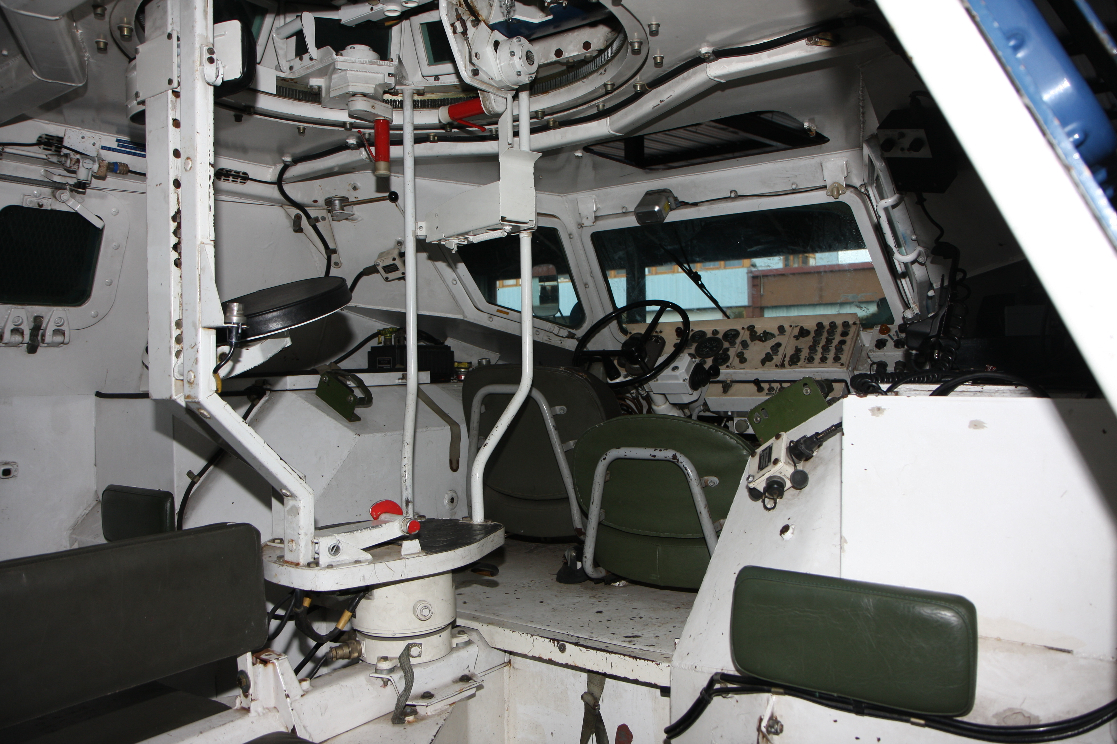 VBRG - Vue intérieure 1